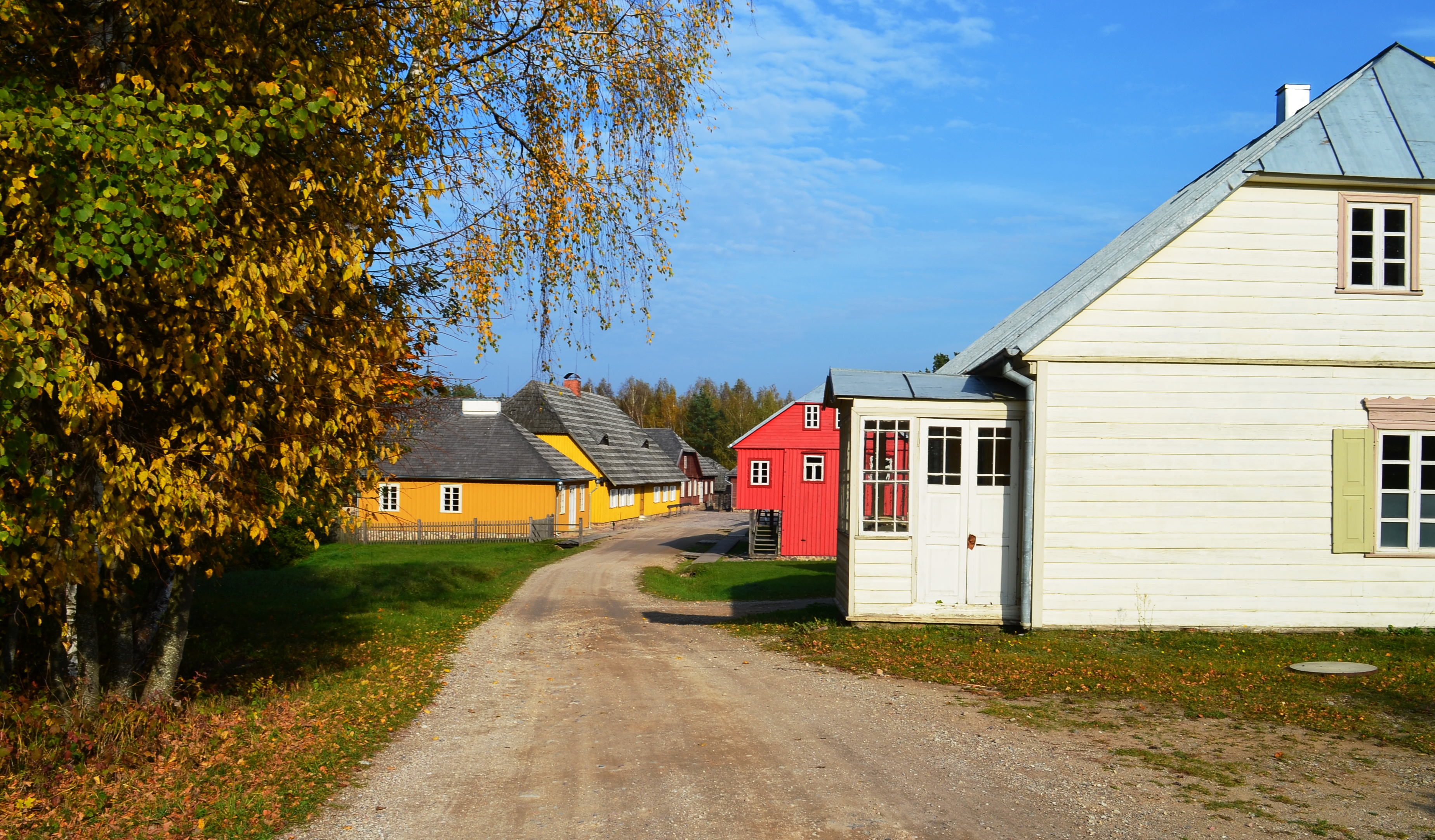 Rumiškės miestelis, Rumšiškių muziejus